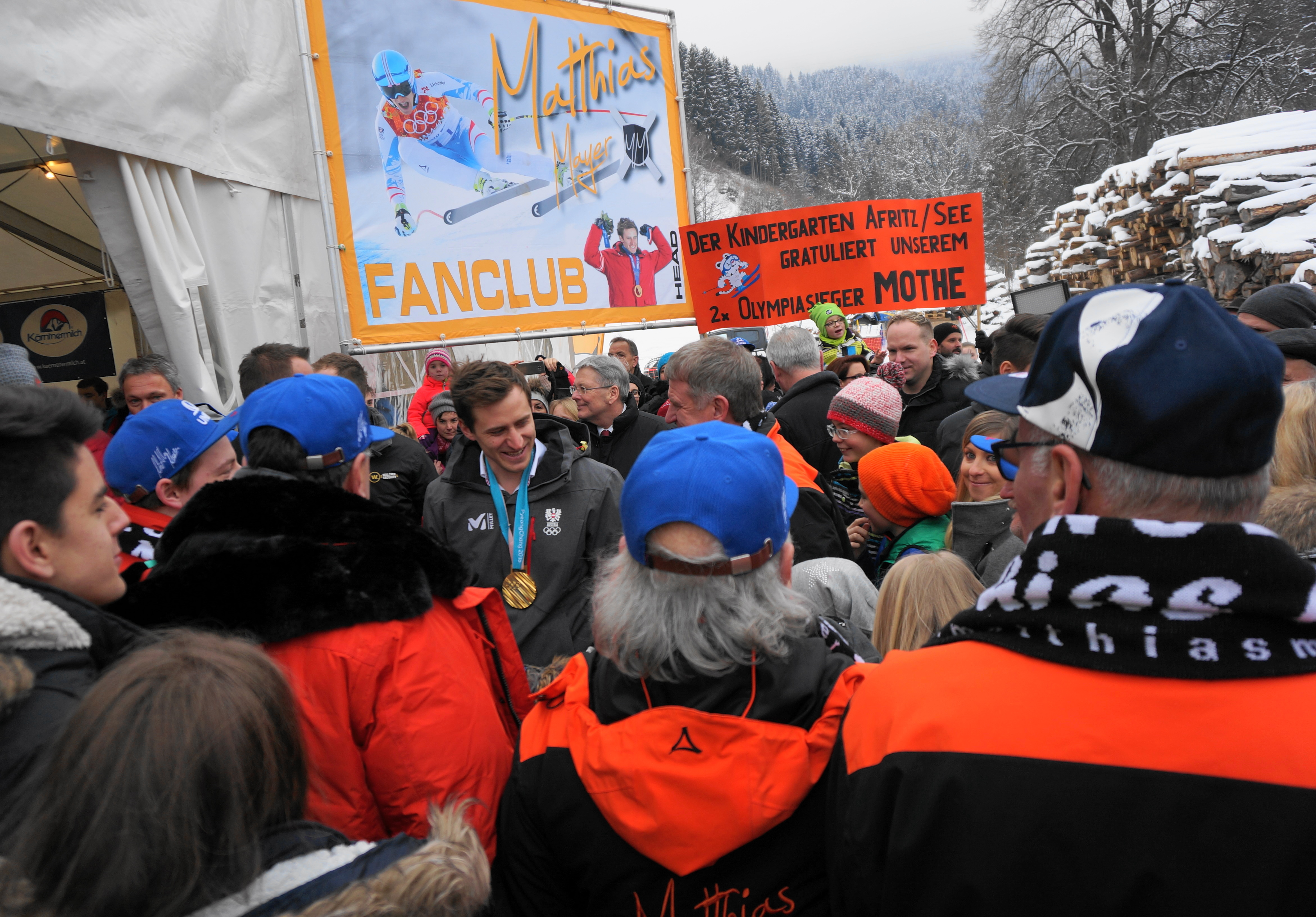 Empfang Matthias Mayer in seiner Heimatgemeinde Afritz Kärnten, Austria, EU für den Super G-Sieg und der Goldmedaille am 16.02.2018 in Pyeongchang in Süd Korea, Asien. Anwesend Landeshauptmann Dr. Peter Kaiser, Bürgermeister Maximilian Linder und Festgäste